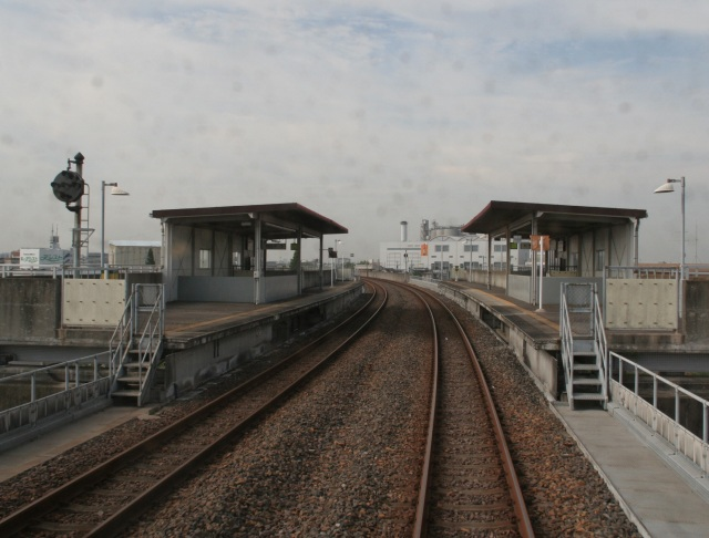 尾張星の宮駅